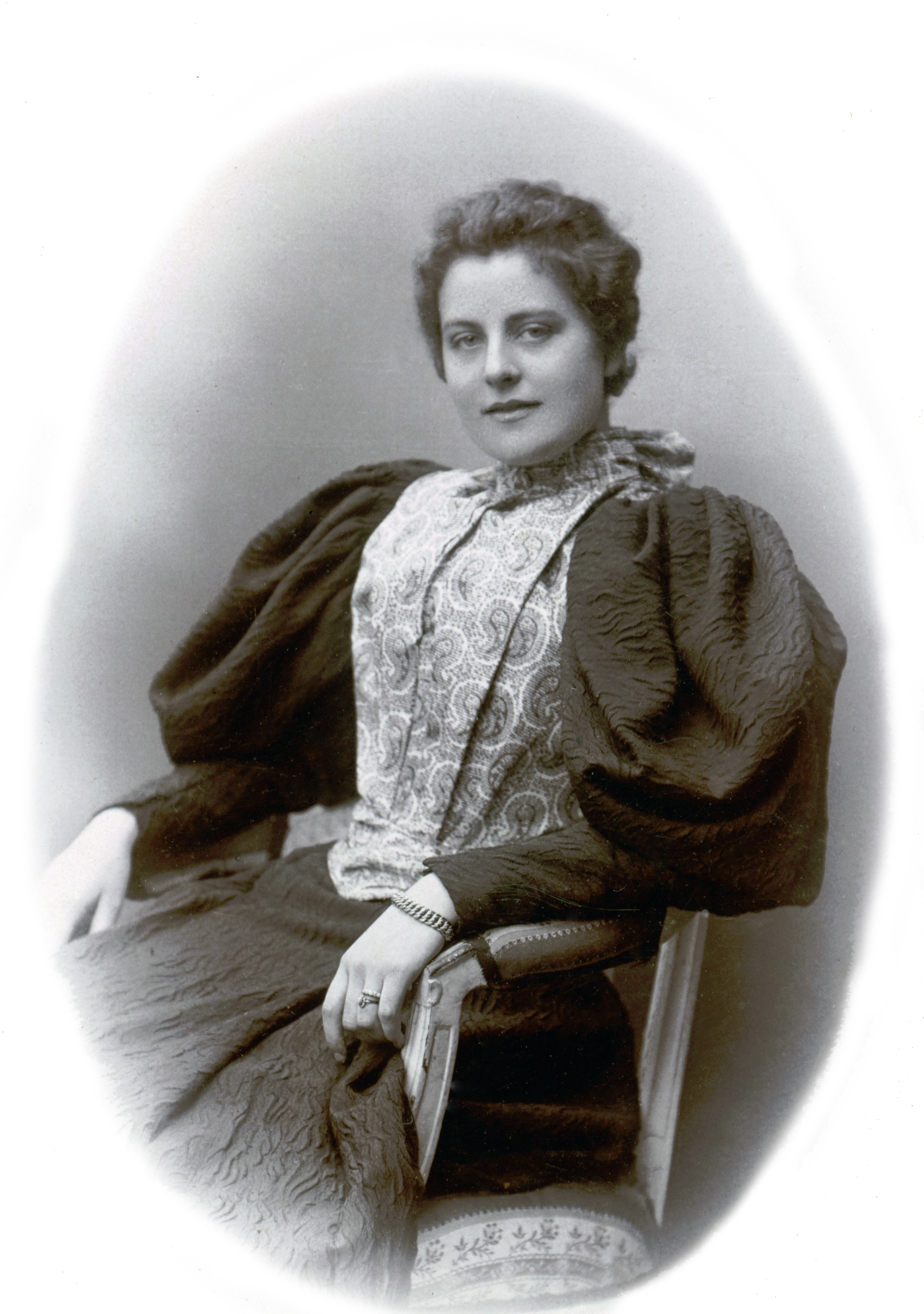 Olga Andersson, skådespelare vid Vasateatern 1896